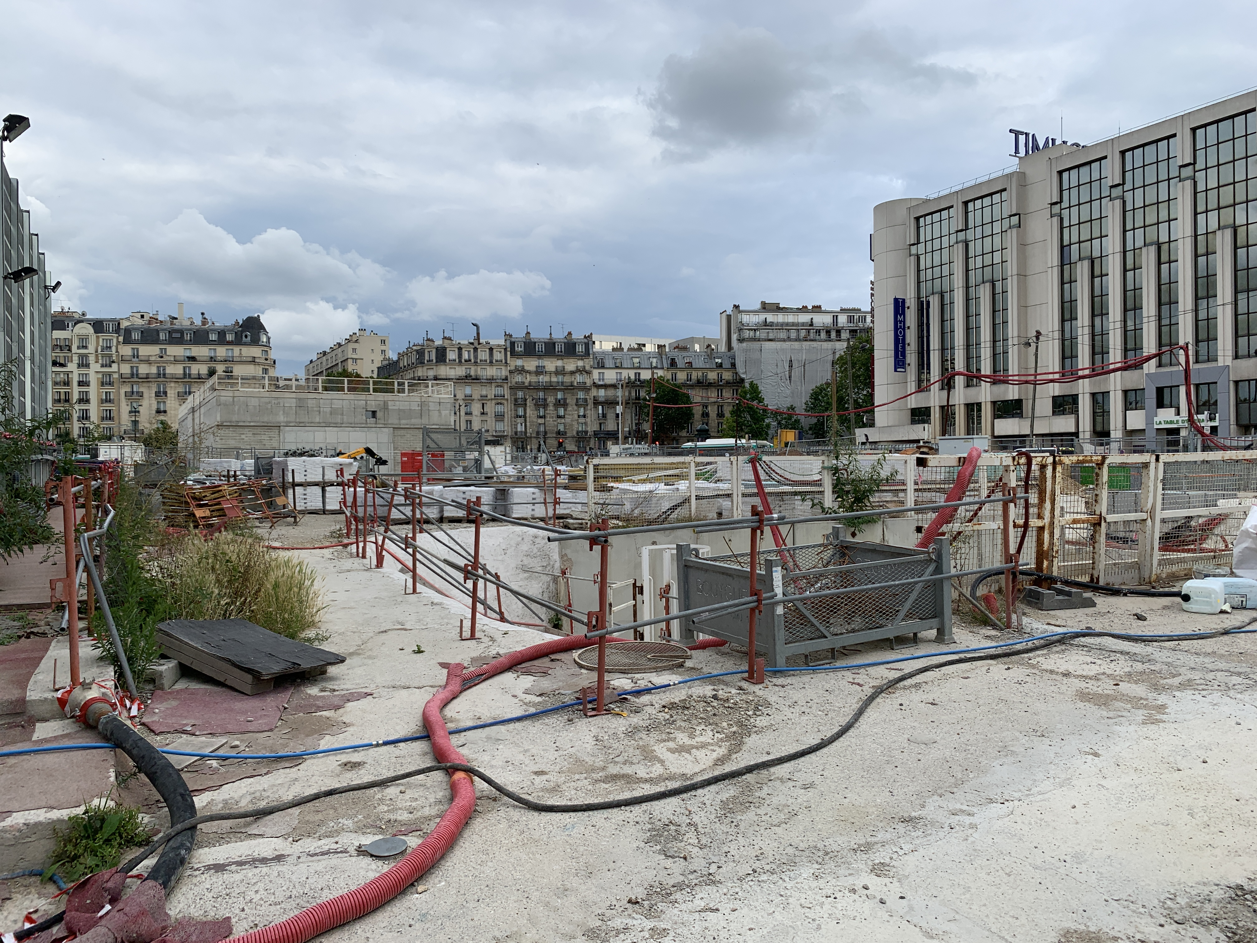 Chantier de la station de métro Porte de Clichy, ligne 14 du métro de Paris, Paris.